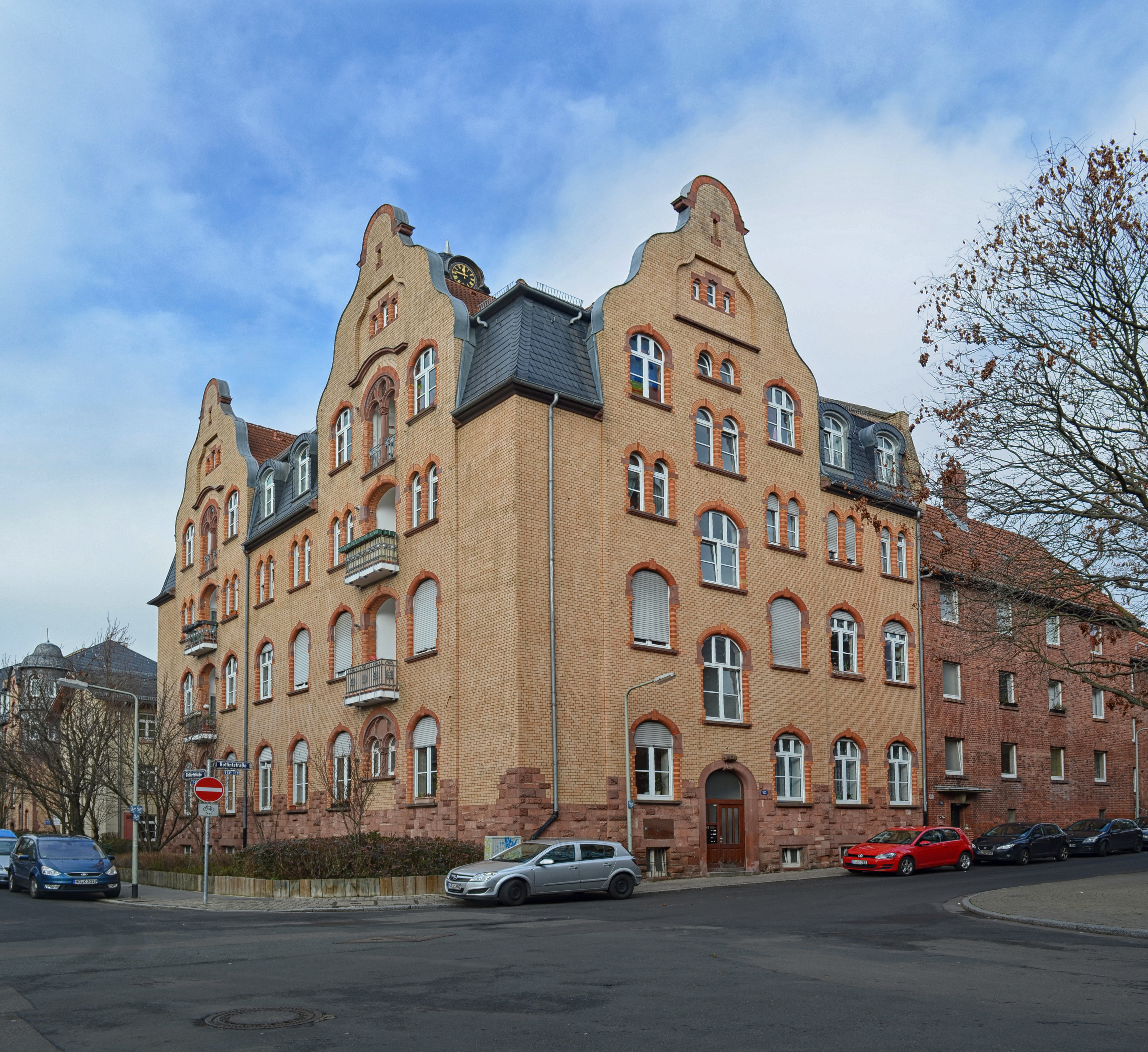 Frankfurt, Gellertstraße 35; sog. Witwerheim. Erbaut 1905 vom Architekten Simon Ravenstein. Das einzige Witwerheim des deutsch-amerikanischen Bankier, Philanthrop, Mäzen und Sozialreformers Charles Hallgarten (1838 Mainz-1908 Frankfurt am Main) auf dem Kontinent in Frankfurt am Main, nach einem Vorbild in Glasgow. Es sollte als tätige Sozialfürsorge unbemittelten Witwern mit zwei, drei oder auch mehreren Kindern bis ein behagliches Heim, seinen Kindern Schutz, Pflege und Erziehung und beiden Teilen bestmöglich auch ein Familienleben ermöglichen. Straßennamenspatron Christian Fürchtegott Gellert (1715-1769) war ein deutscher Dichter und Moralphilosoph der Aufklärung.